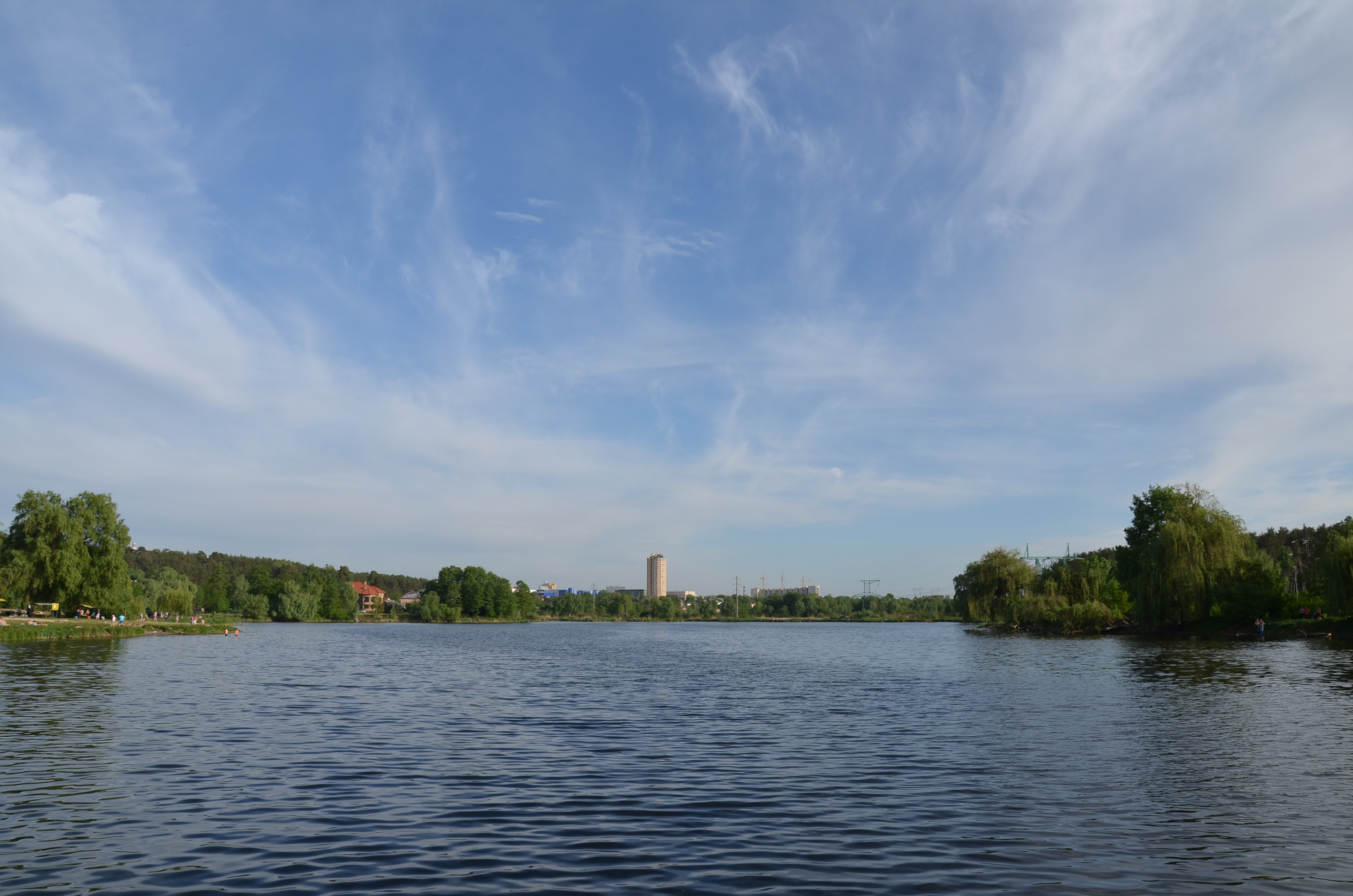 Святошинський лісопарк, Святошинський район